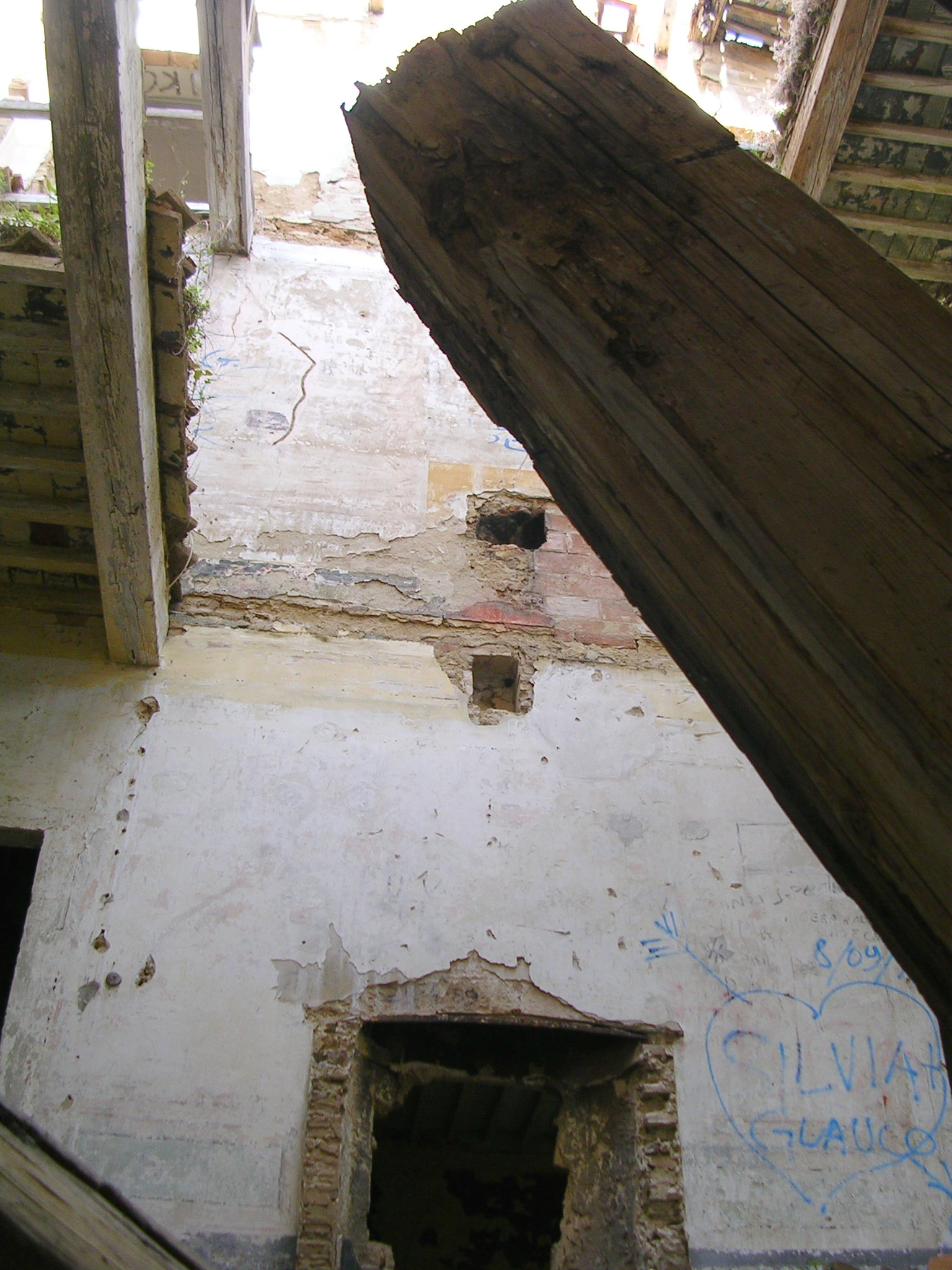 Livorno: la Villa Maurogordato ridotta da decenni allo stato di rudere a causa del disinteresse della collettività. La villa infatti non fu colpita dai bombardamenti della seconda guerra mondiale ma fu depredata nel tempo e mai restaurata. Scorcio dell'interno ormai distrutto.